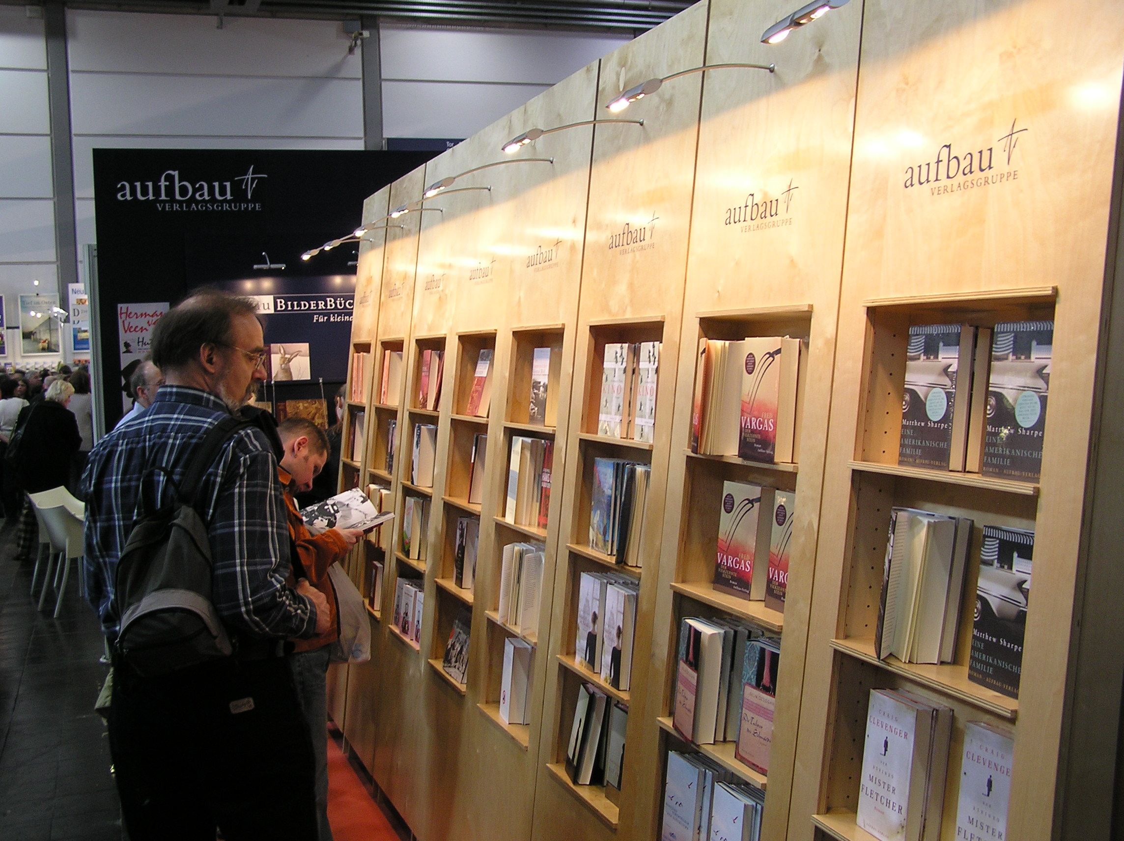 Teil des Standes des Aufbau Verlag auf der Buchmesse Leipzig 2005.